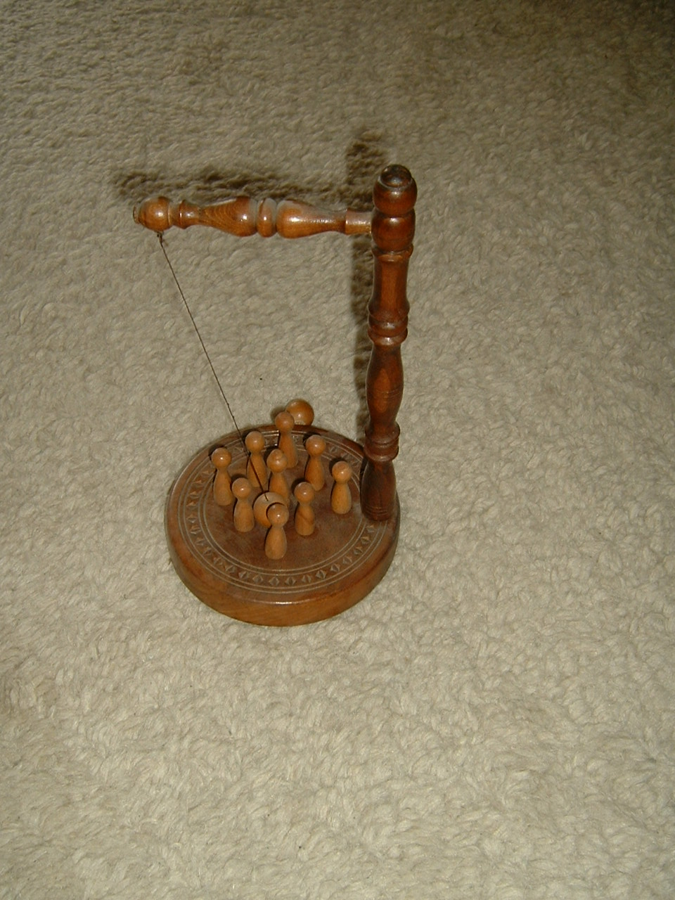 Einfaches Tischkegelspiel, gedrechseltes Holz, an der Seite Ziehknopf zum Aufstellen der Kegel